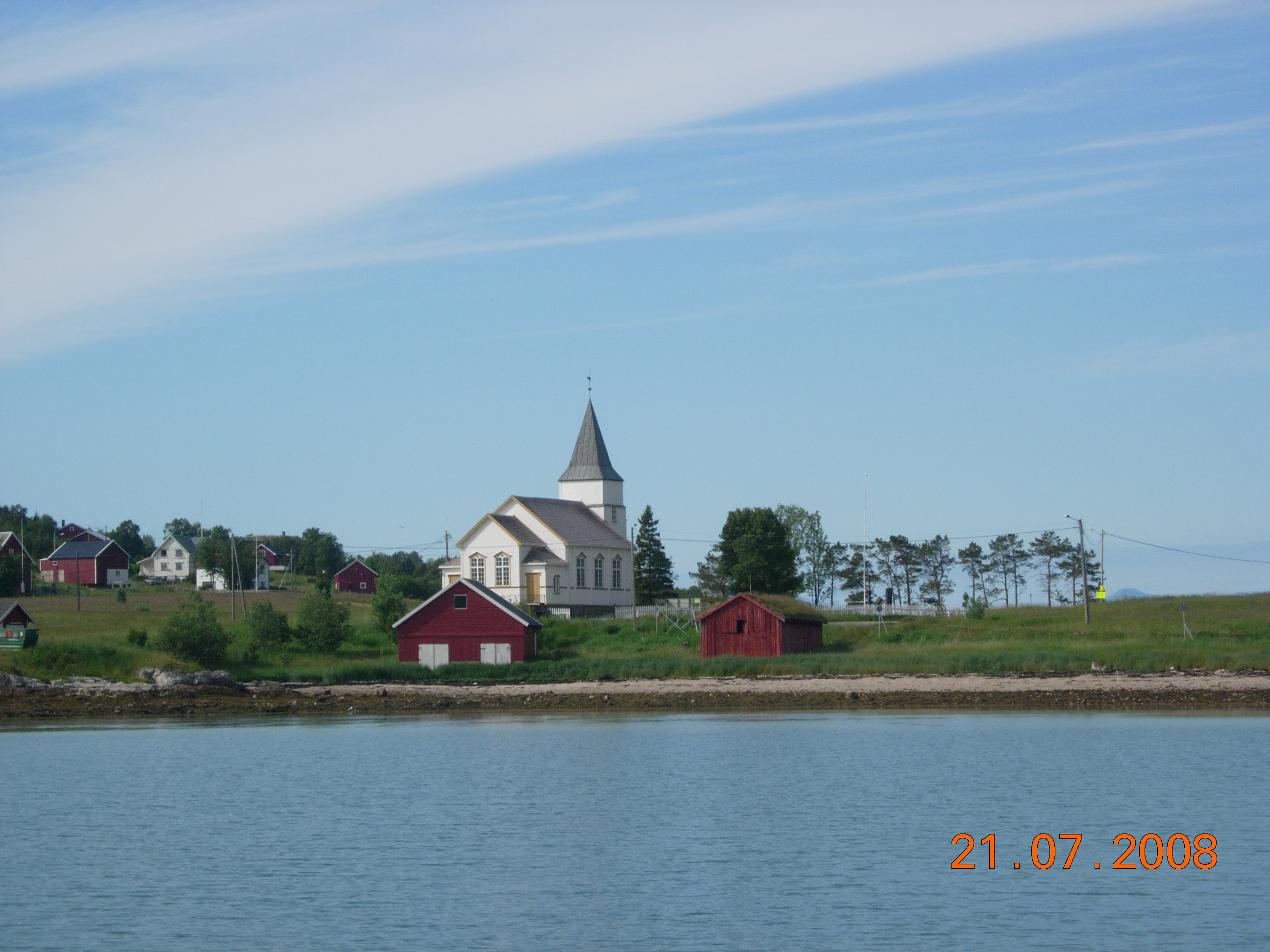 Stonglandseidet